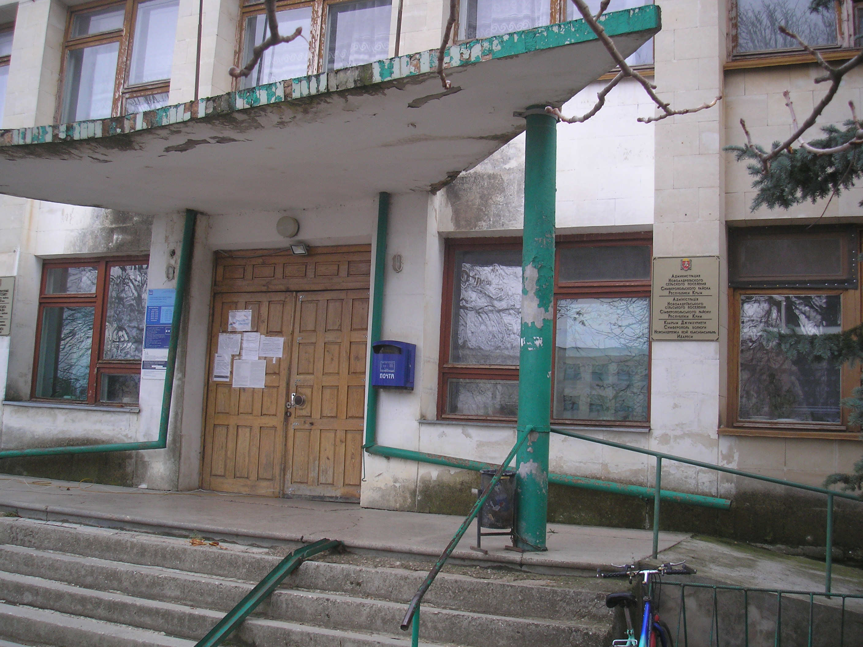 Село Новоандреевка, Симферопольский район, Крым